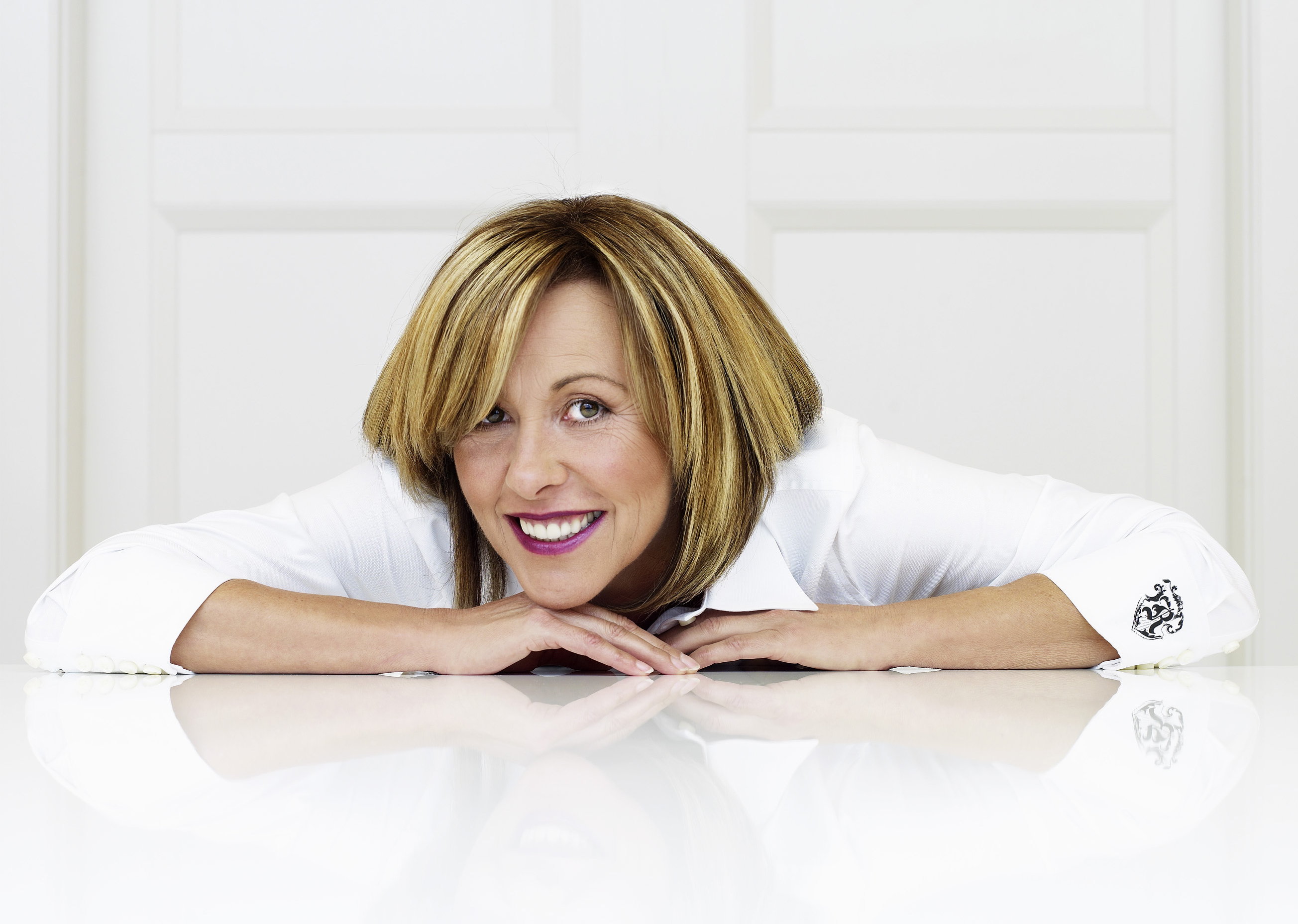 Margarethe Schreinemakers TV-Moderatorin und Journalistin